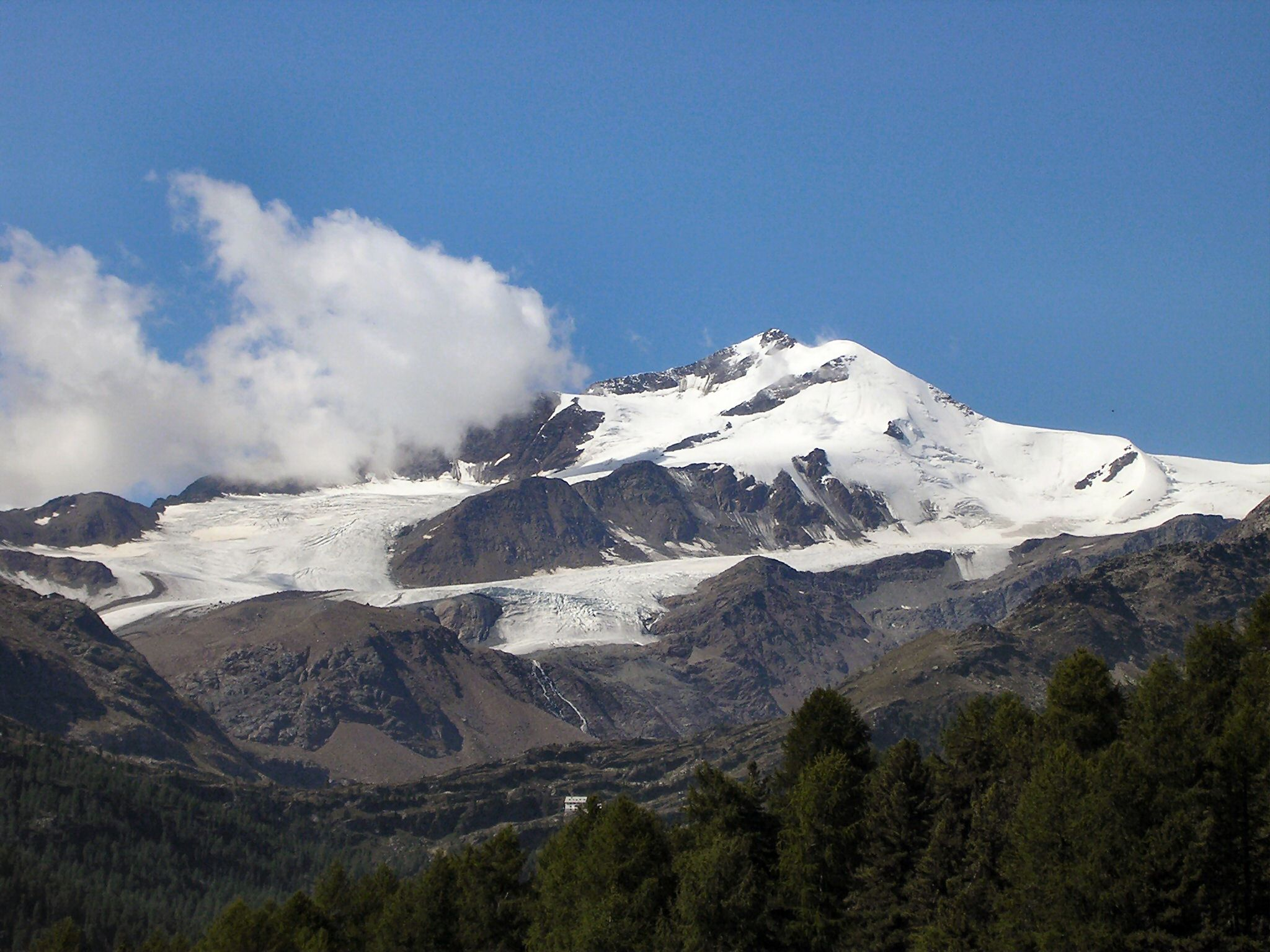 Ghiacciaio del Cevedale visto dalla val Martello, nel Parco Nazionale dello Stelvio. Autore: Paolo Carboni --L'uomo in ammollo 18:44, Ago 24, 2005 (CEST)